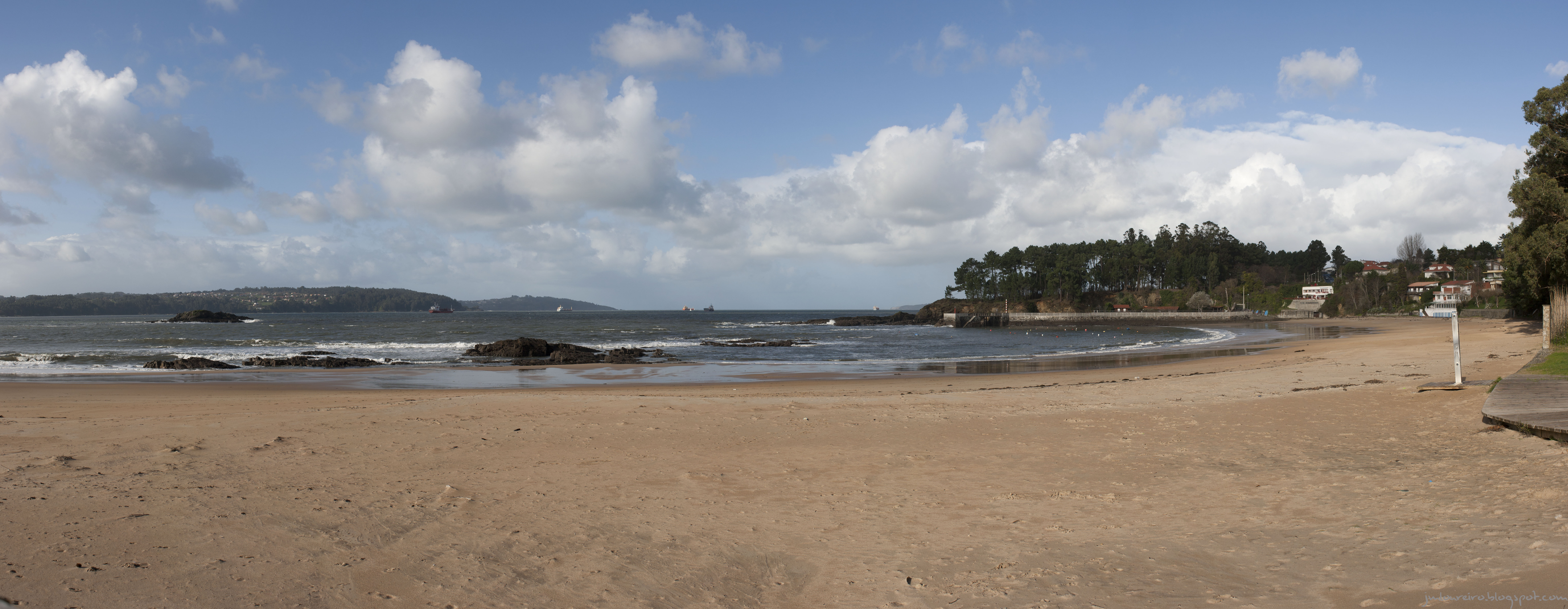 Panorámica Playa de Perbes